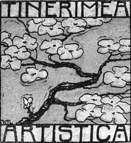 Sigla Tinerimii artistice din anul 1904